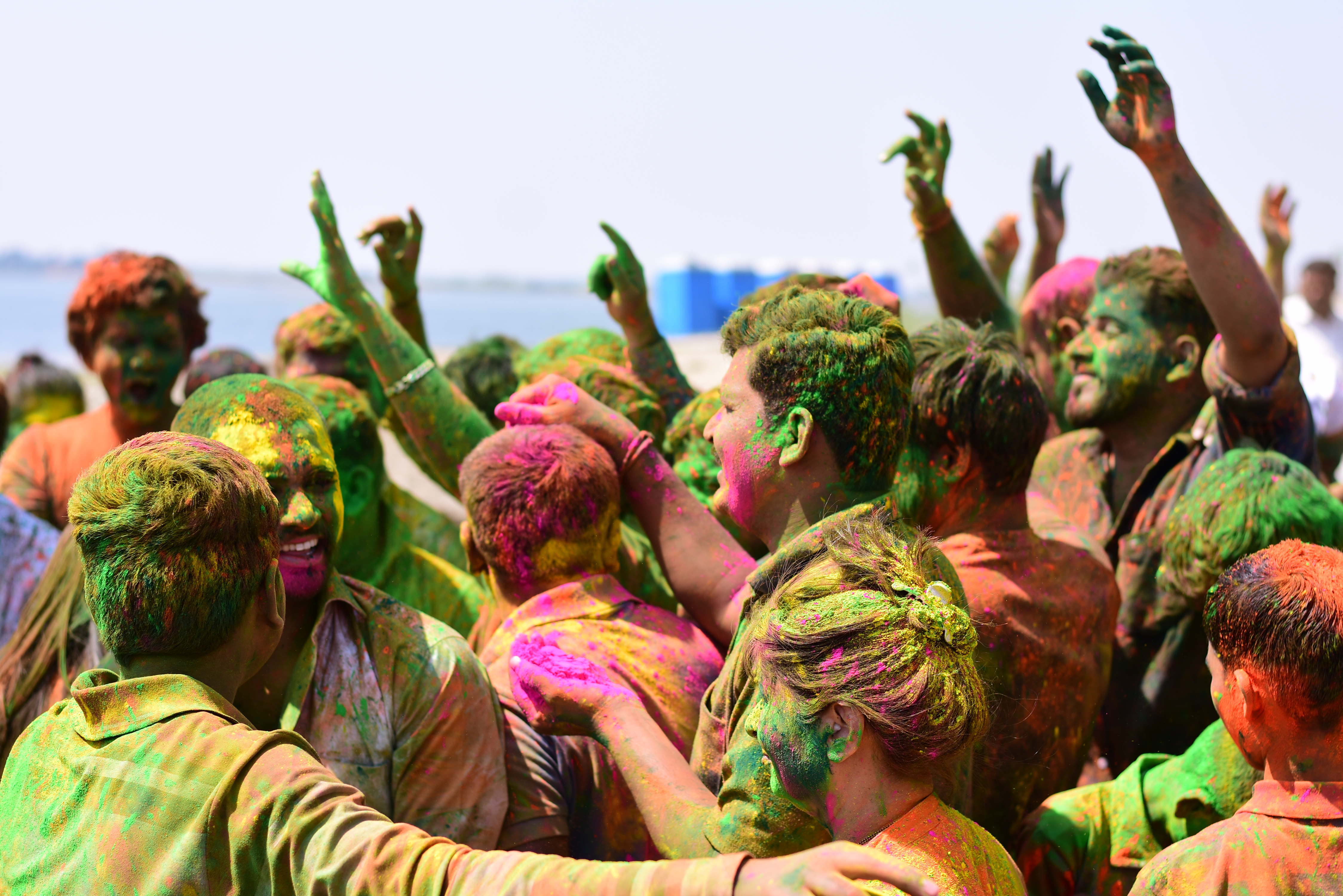 होळी (रंगपंचमी) हा सण भारतात मोठ्या प्रमाणावर साजरा केला जातो, बबन चित्रपटाच्या टिम ने साजरी केलेल्या होळी या सणाचे काही क्षणचित्रे.